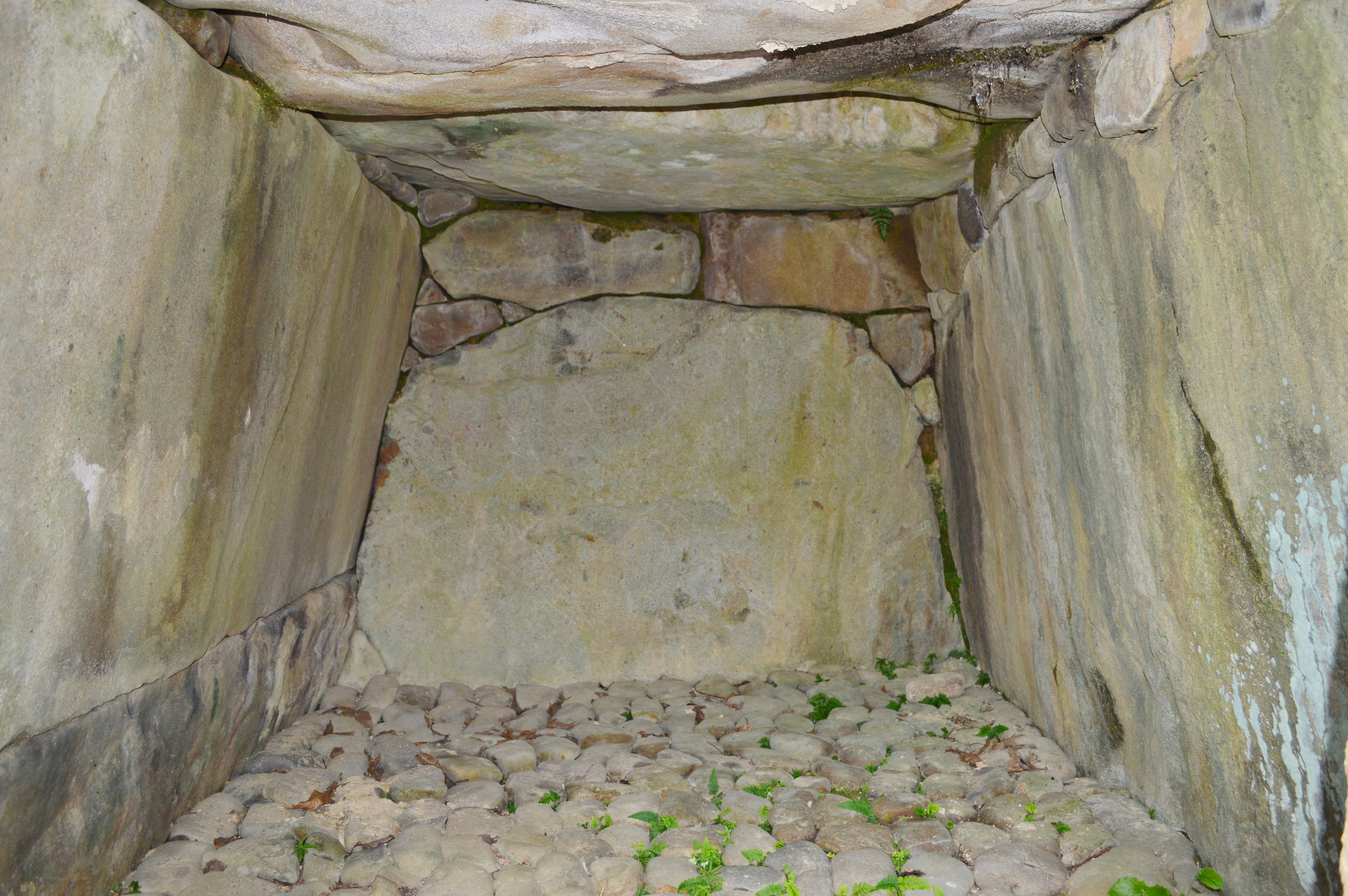 岩内1号墳 石室玄室